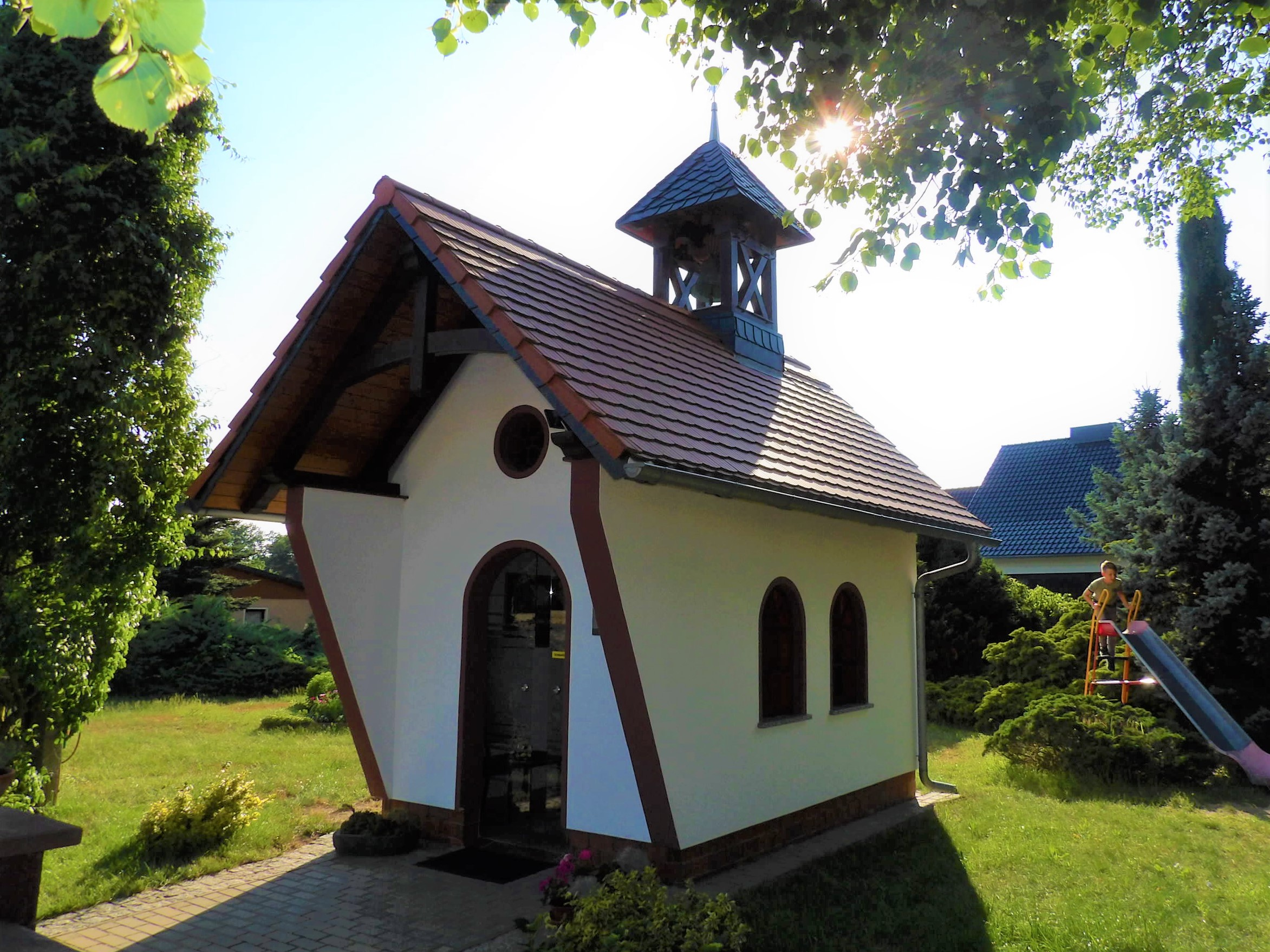 Die 2015 geweihte Kapelle in Lömischau Hornjoserbsce: W lěće 2015 poswjećena kapałka w Lemišowje